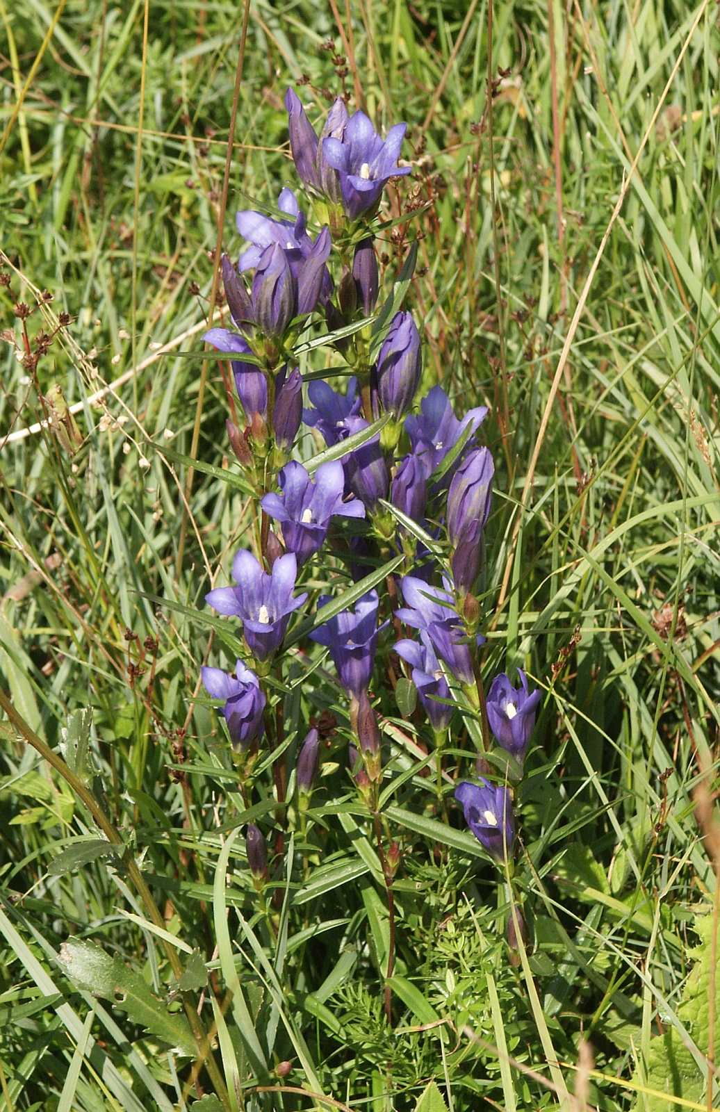 Gentiana pneumonanthe, Schwäbische Alb, Germany